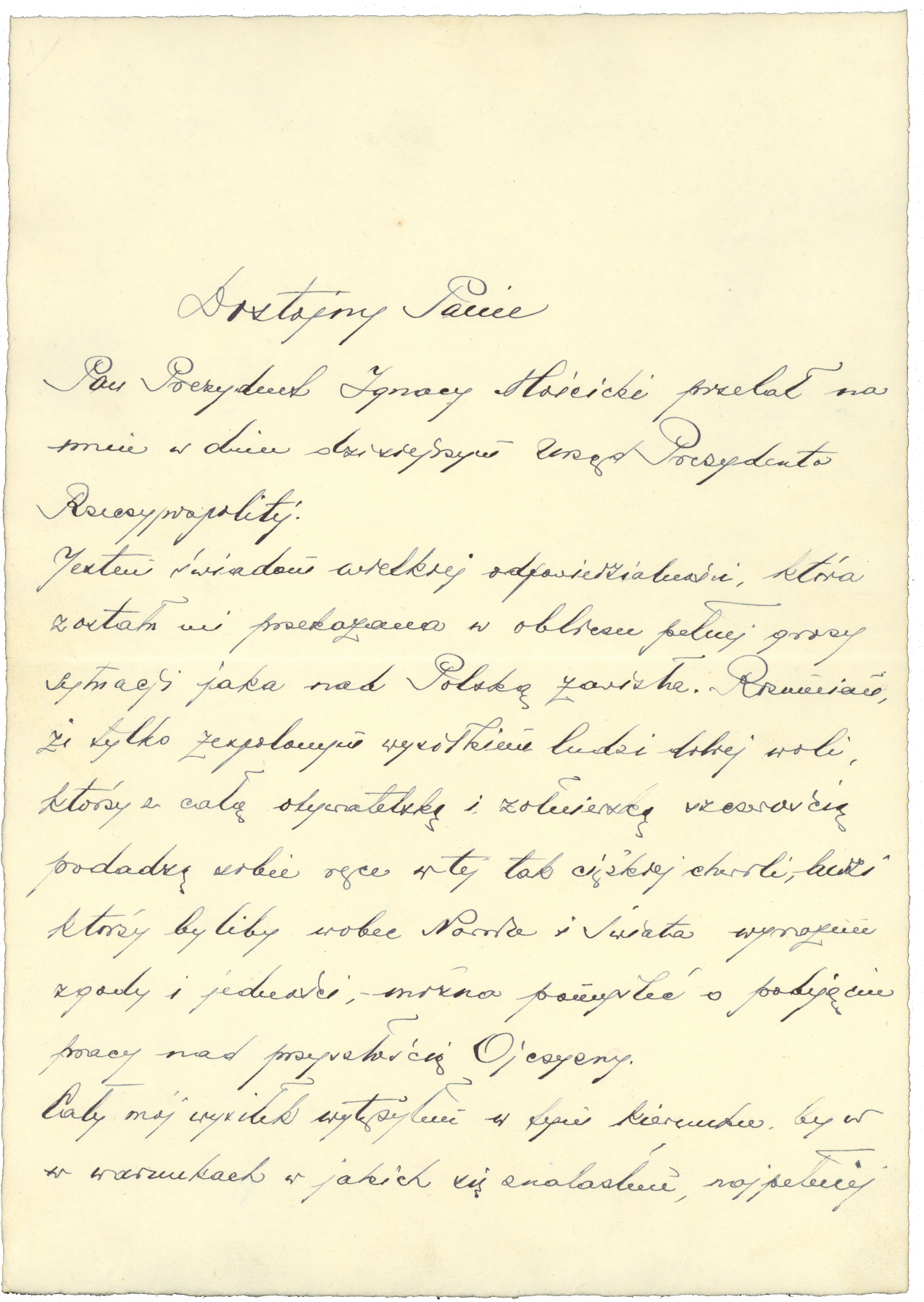 List Władysława Raczkiewicza informujący Ignacego Paderewskiego o tym, że Ignacy Mościcki przekazał mu włdzę prezydencką